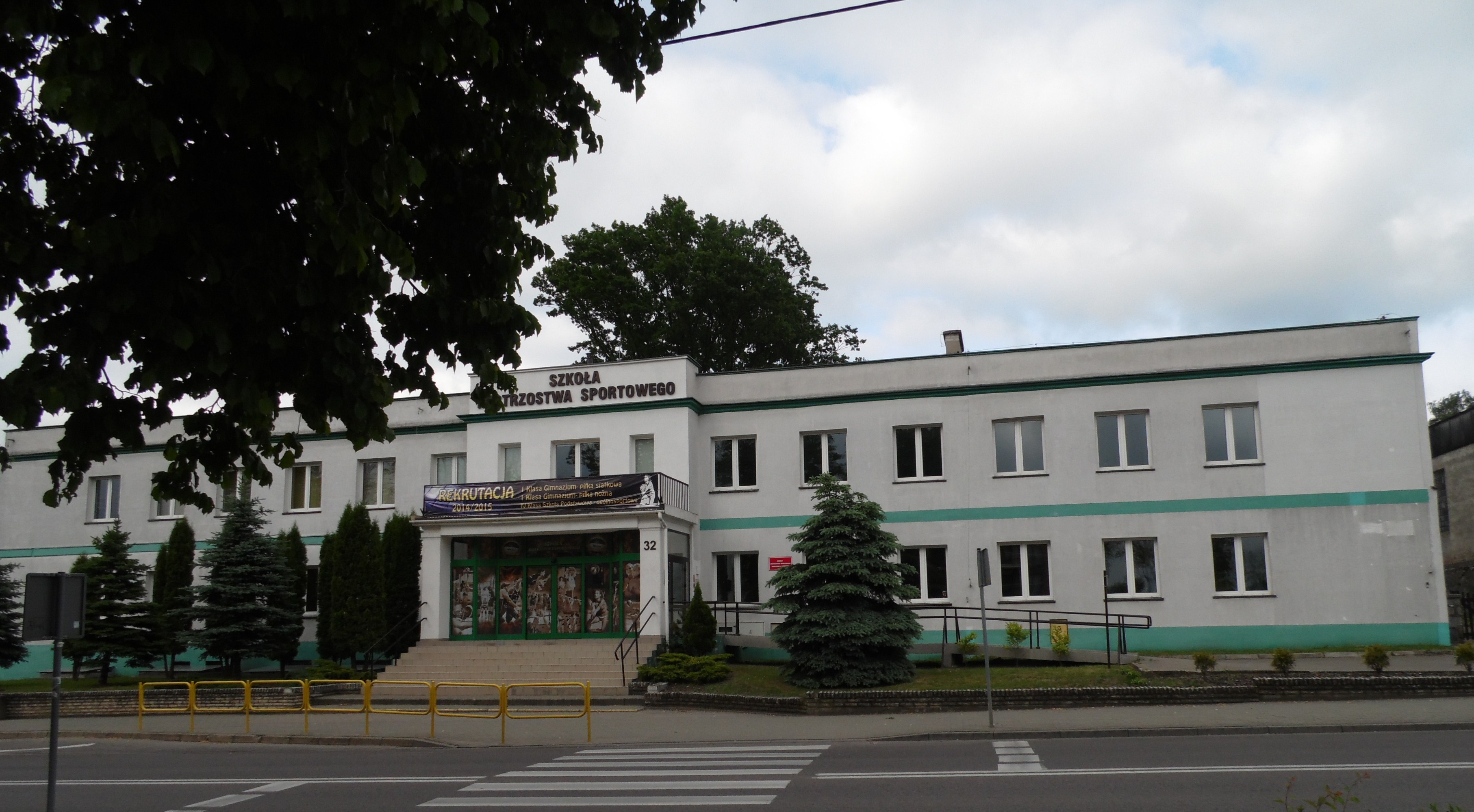 SZKOŁA MISTRZOSTWA SPORTOWEGO.